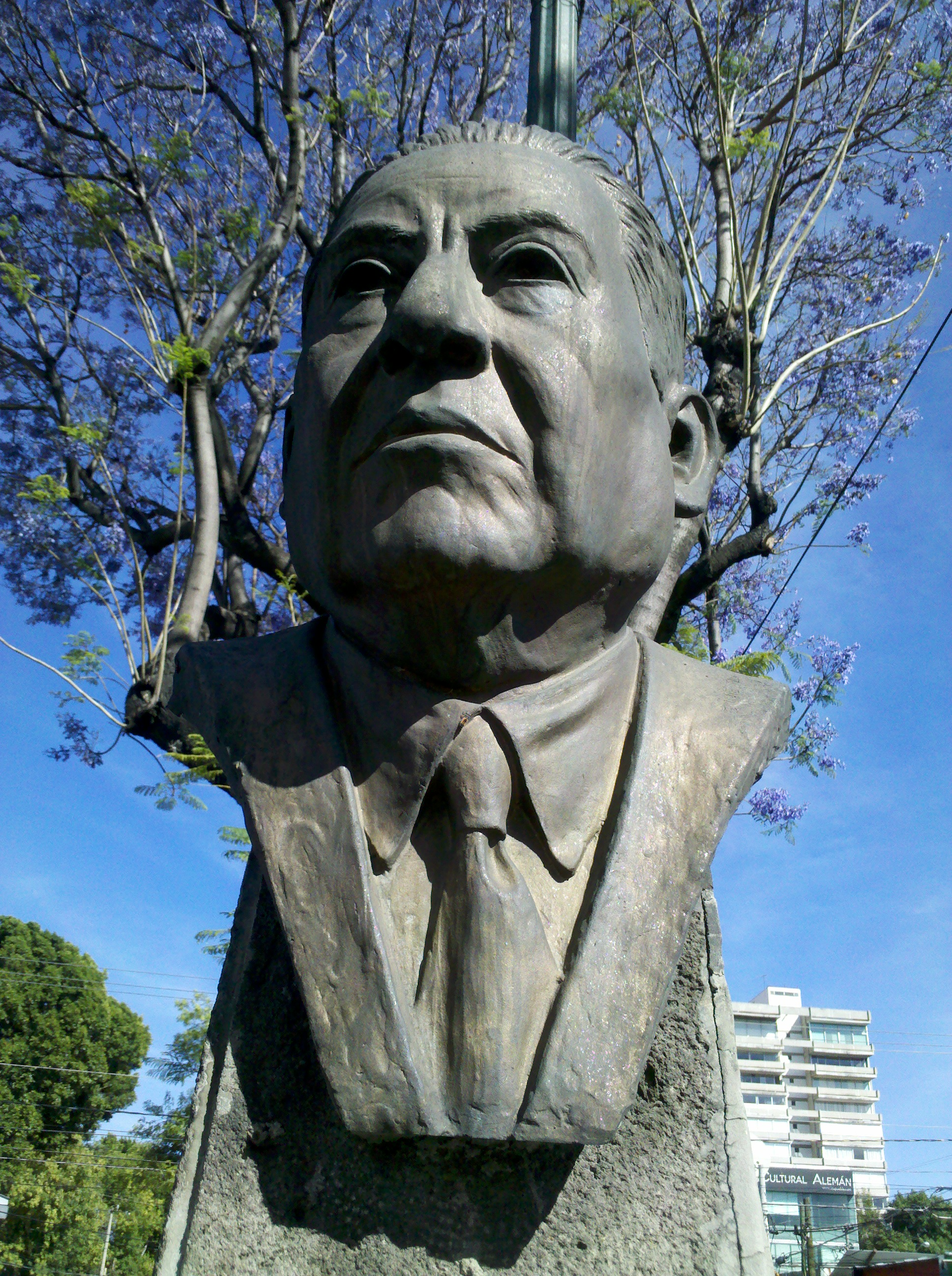 Monumento a Gregorio de Gante, Puebla, México. Esquina de la 43 poniente y 16 de septiembre.